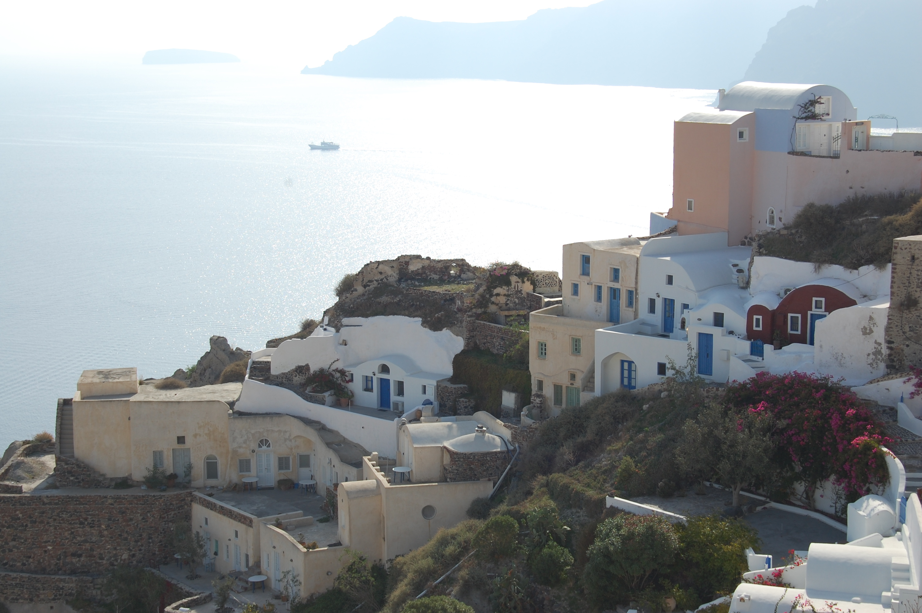 υπόσκαφο